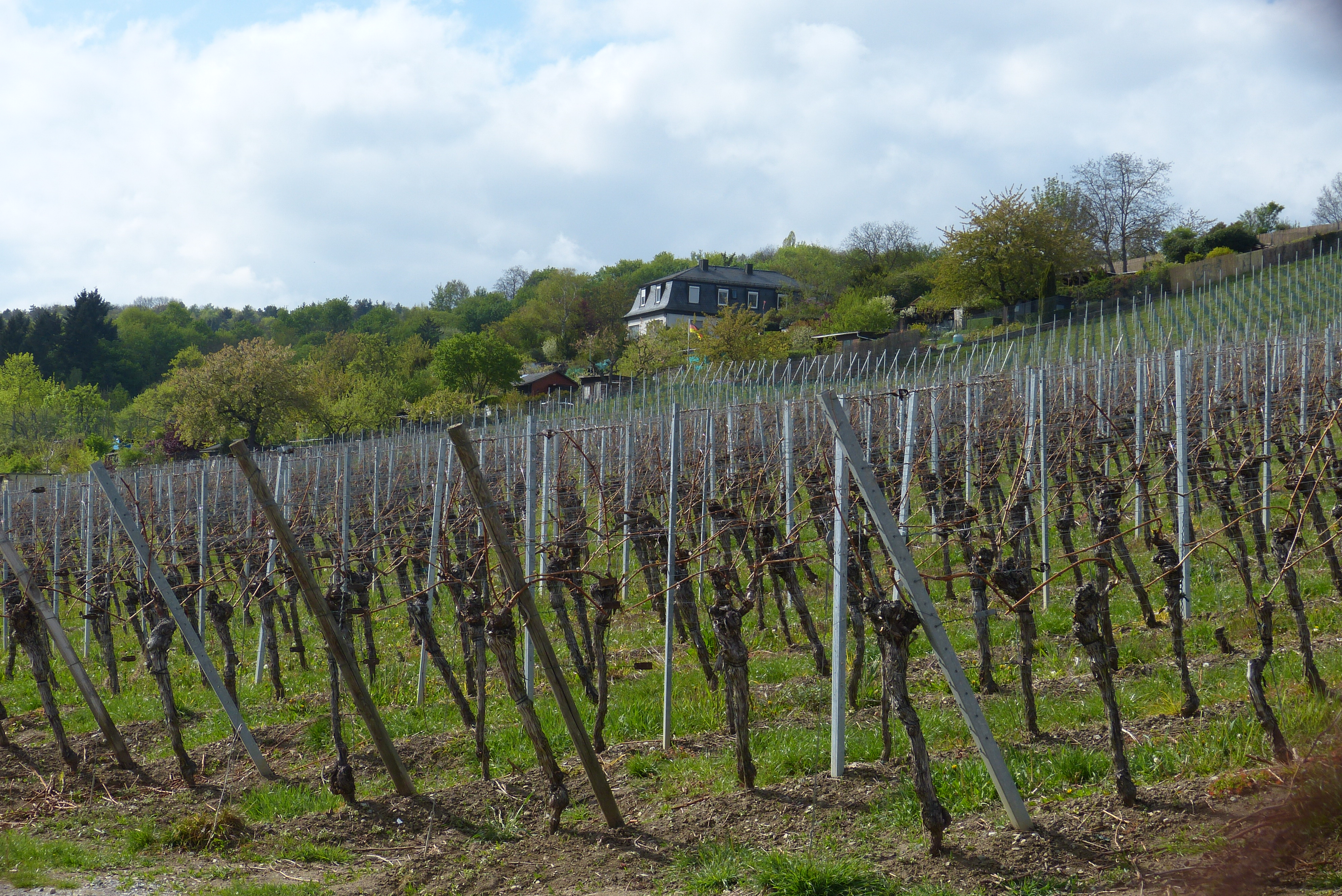 Weinberg in Würzburg-Grombühl (Würzburger Stein)